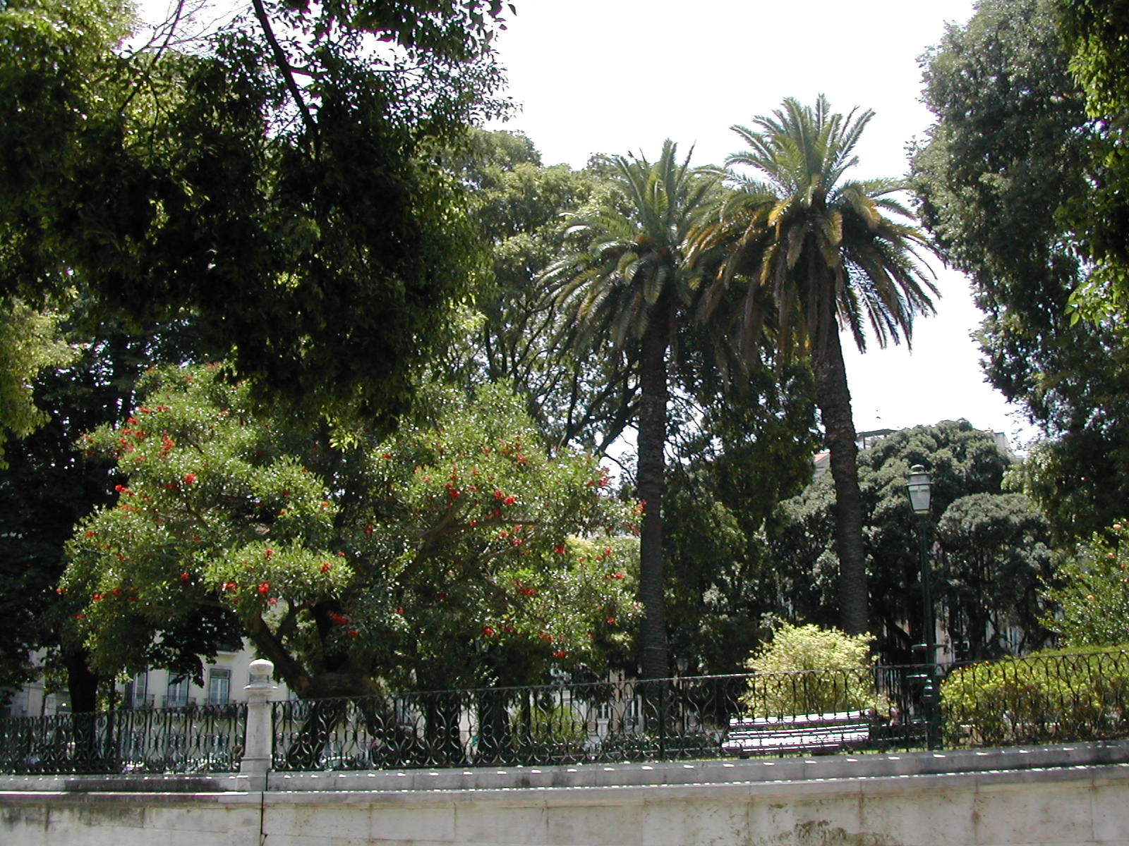 Jardim Alfredo Keil, Praça da Alegria, Lisboa